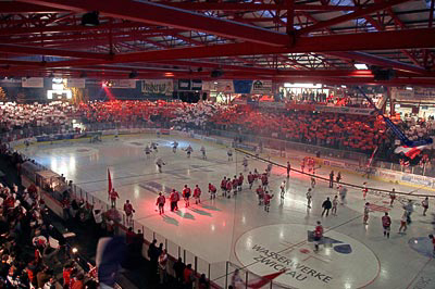 Das Kunsteisstadion im Sahnpark kurz vor Spielbeginn